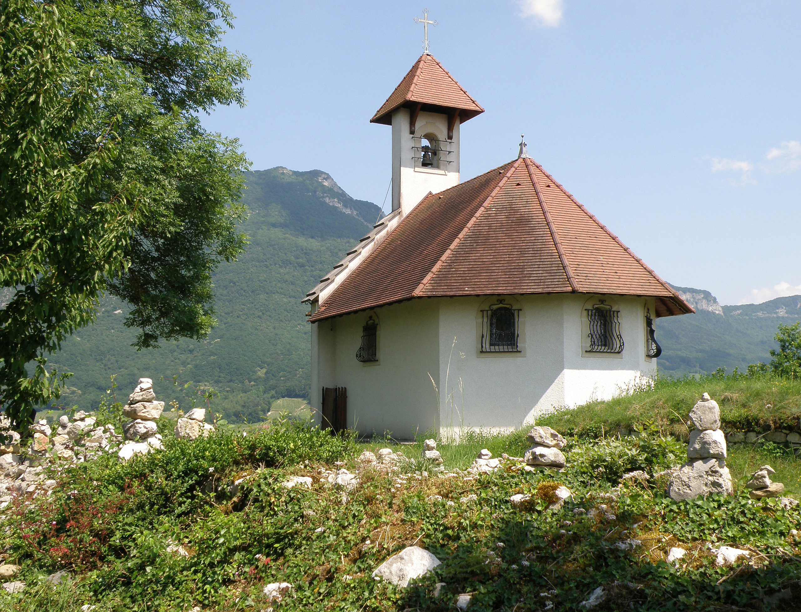 Jongieux, comm. du départ. de la Savoie (région Rhône-Alpes, France). Chapelle Saint-Romain.